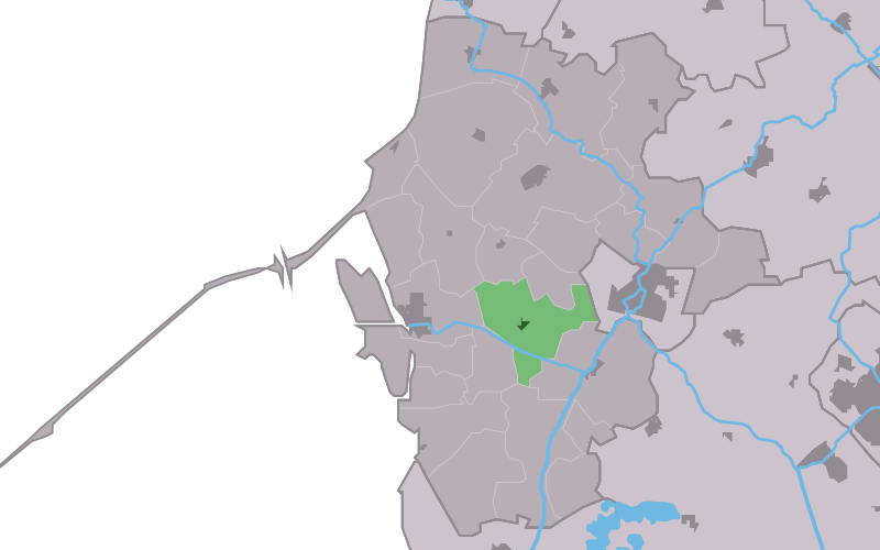 Kaartsje fan himrik fan Eksmoarre